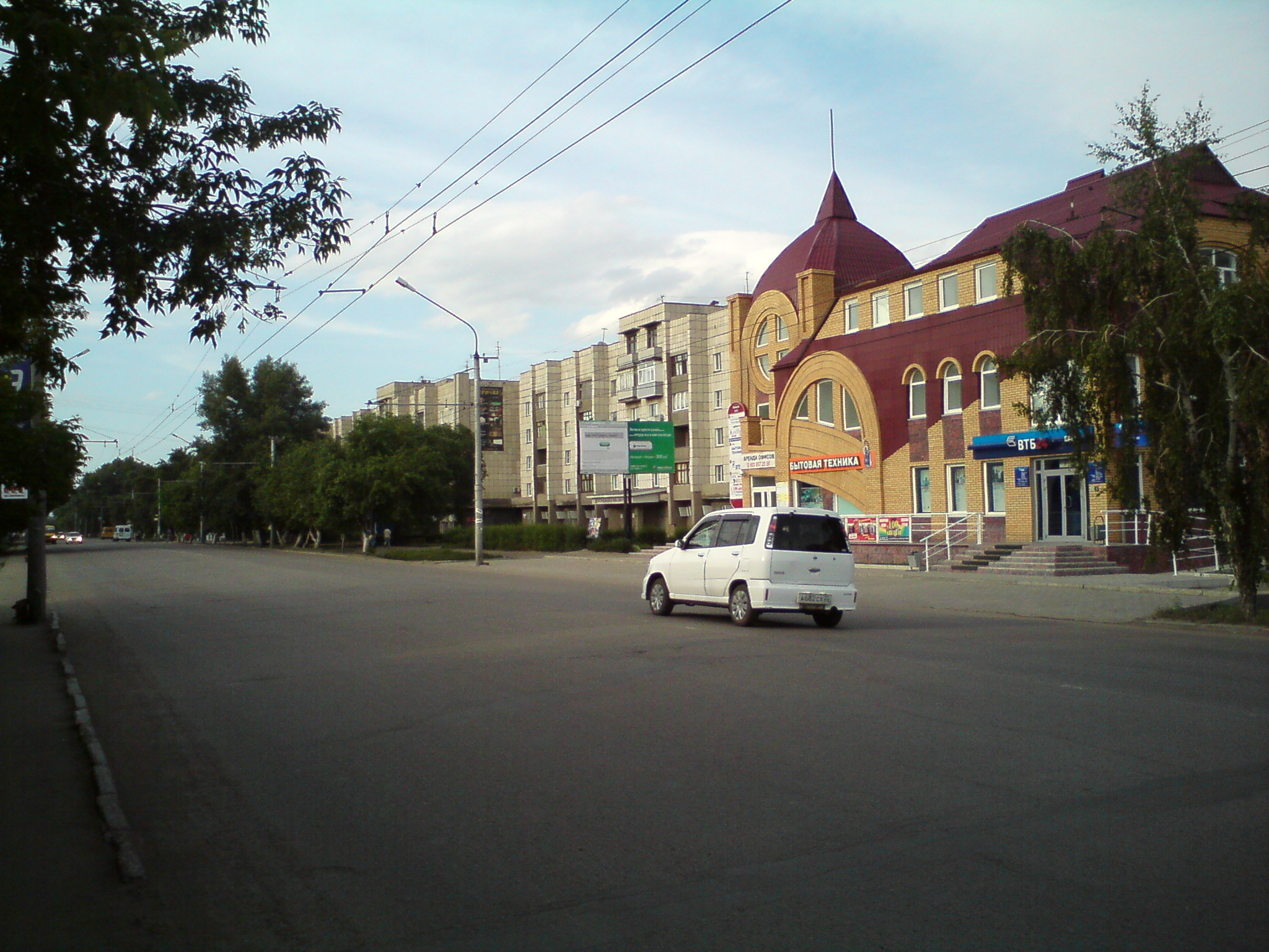 Алтайский край, г.Рубцовск, пр.Ленина, ВТБ-24